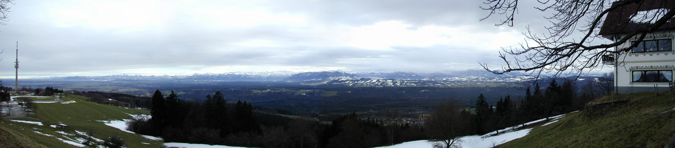 Panorama du Haut Peissenberg